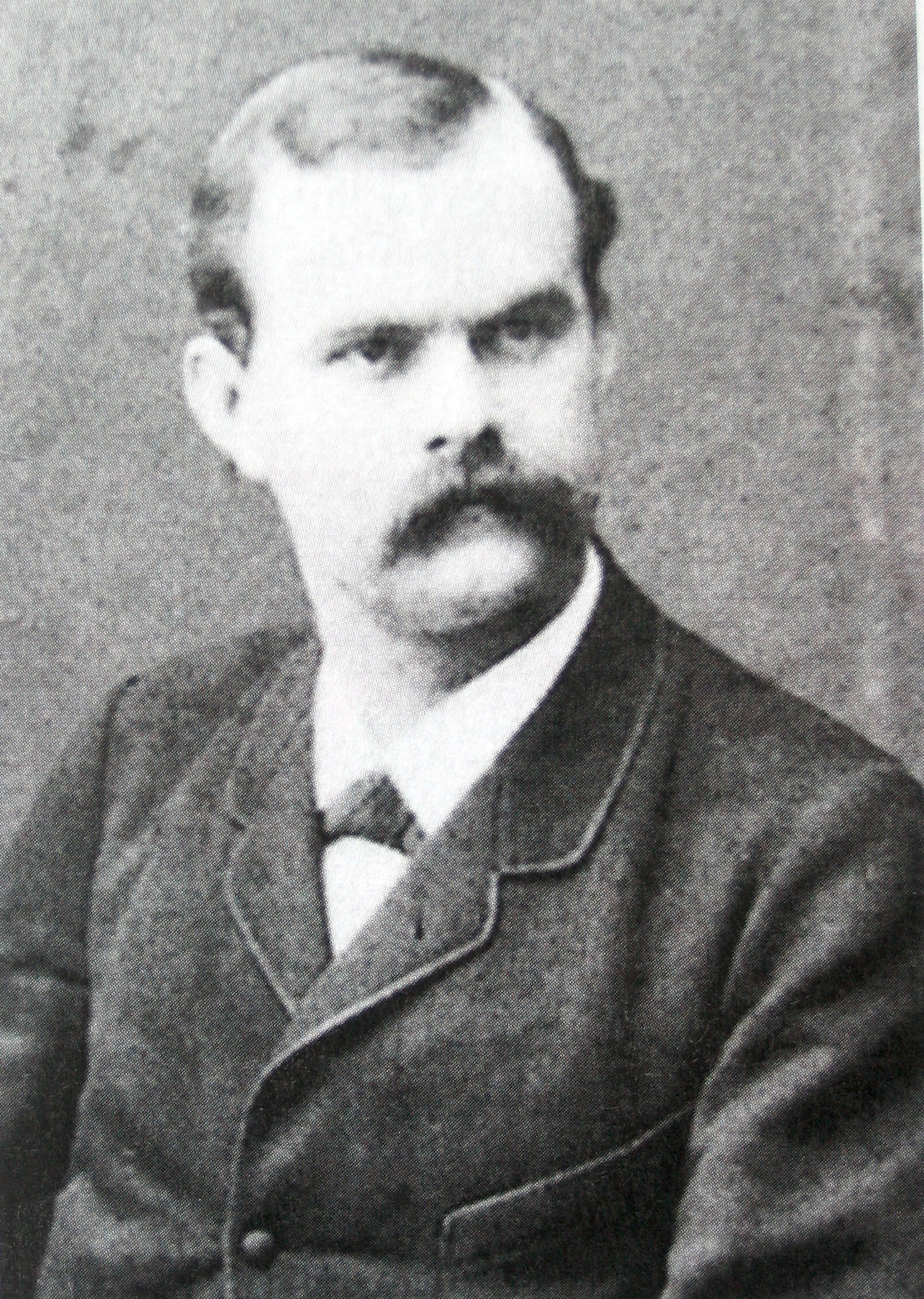 Friedrich Emil Welti, Sohn des Bundesrates Emil Welti